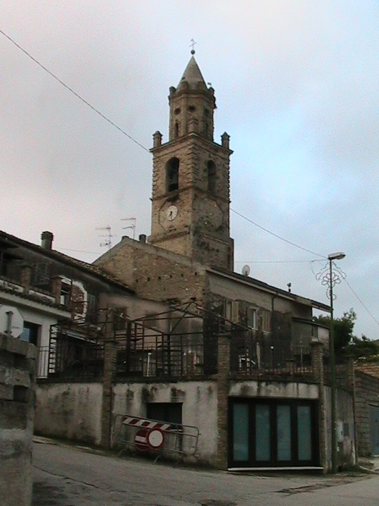 Scorcio